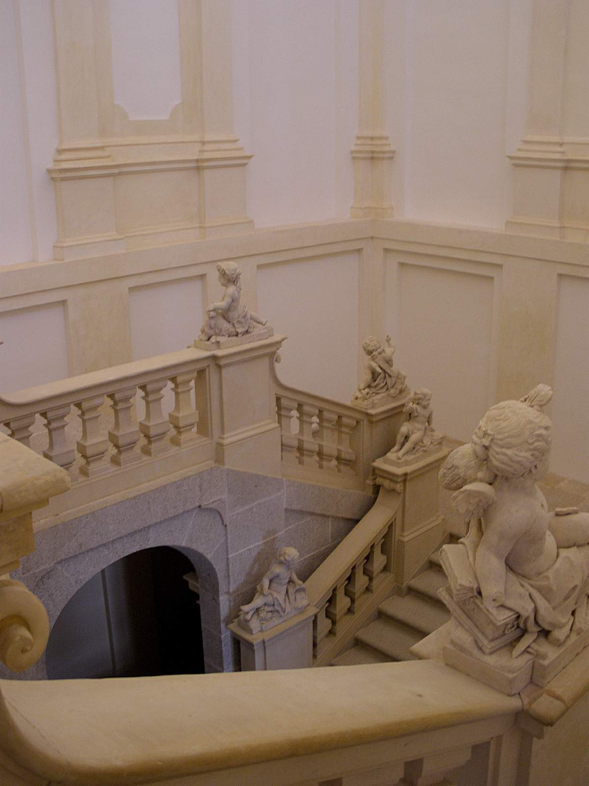 Palacio Real de Riofrío (Segovia)